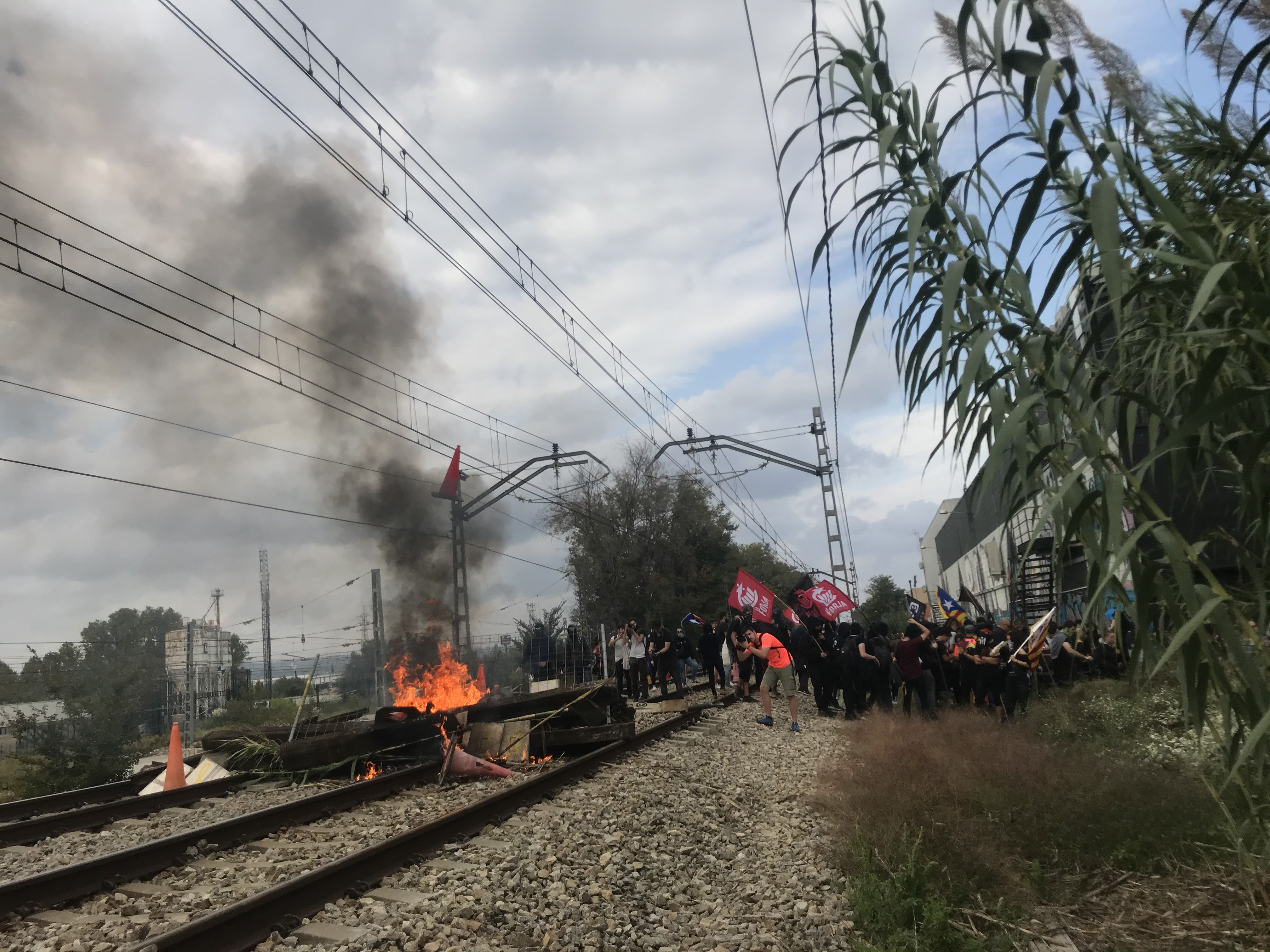 Protestes a Girona el dilluns 14 d'octubre de 2019 després d'anunciar-se la sentència del judici del procés. Manifestants tallen la línia de Rodalies entre Riudellots i Girona i bloquegen el pas d'un tren de passatgers